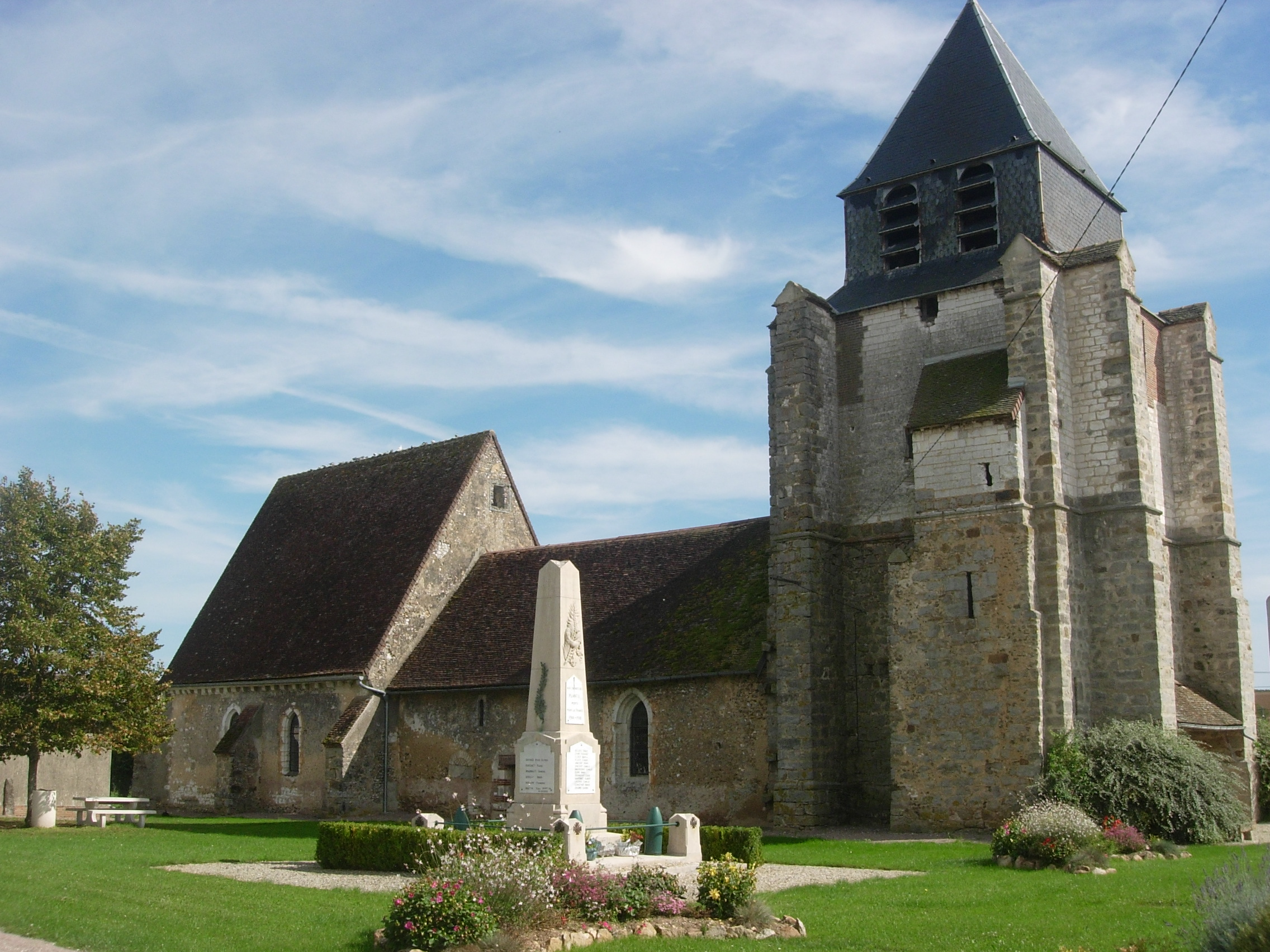 Eglise de Planty (Aube)